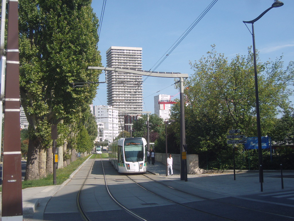 Paris 13e arrondissement, station Poterne des Peupliers, vue en direction de la place d'Italie, quai à l'est de la rue Gouthière